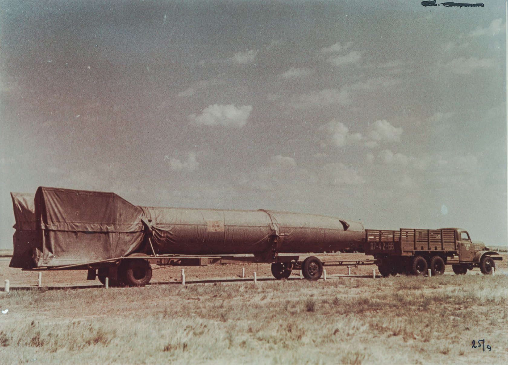 Автопоезд с баллистической ракетой дальнего действия Р-2, разработанной под руководством С.П. Королева в ОКБ-1.